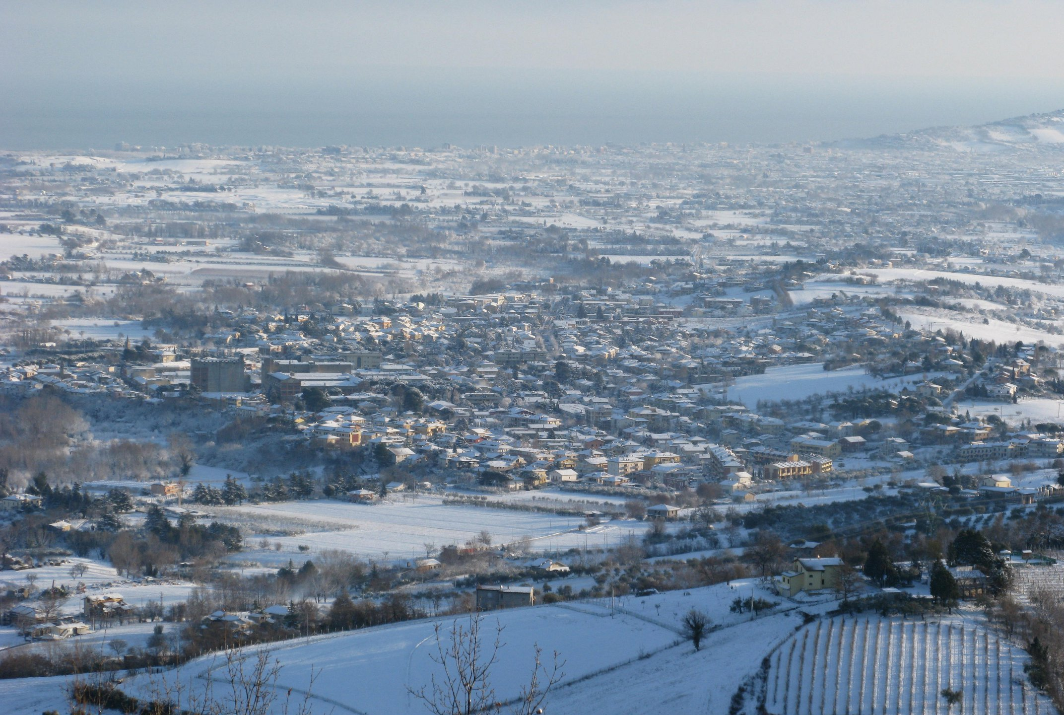 Panorama invernale di Morciano di Romagna.